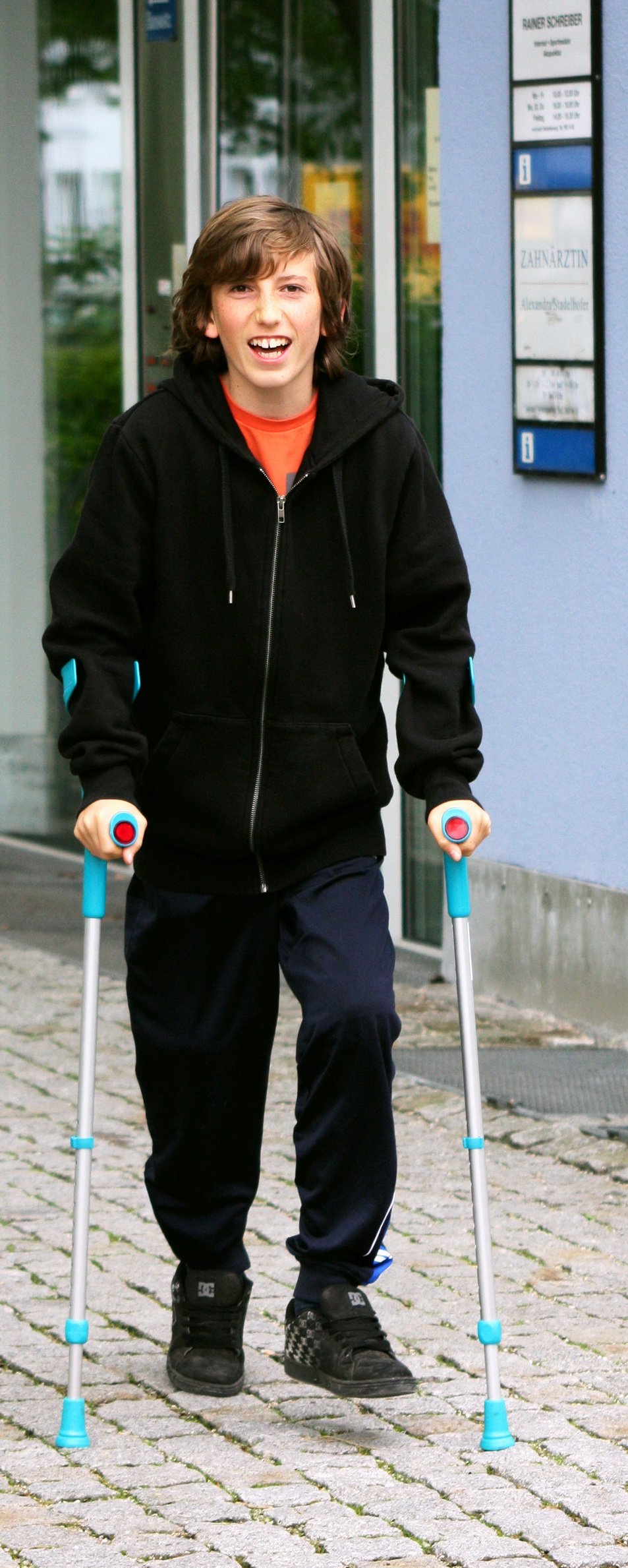 Person mit Krücken